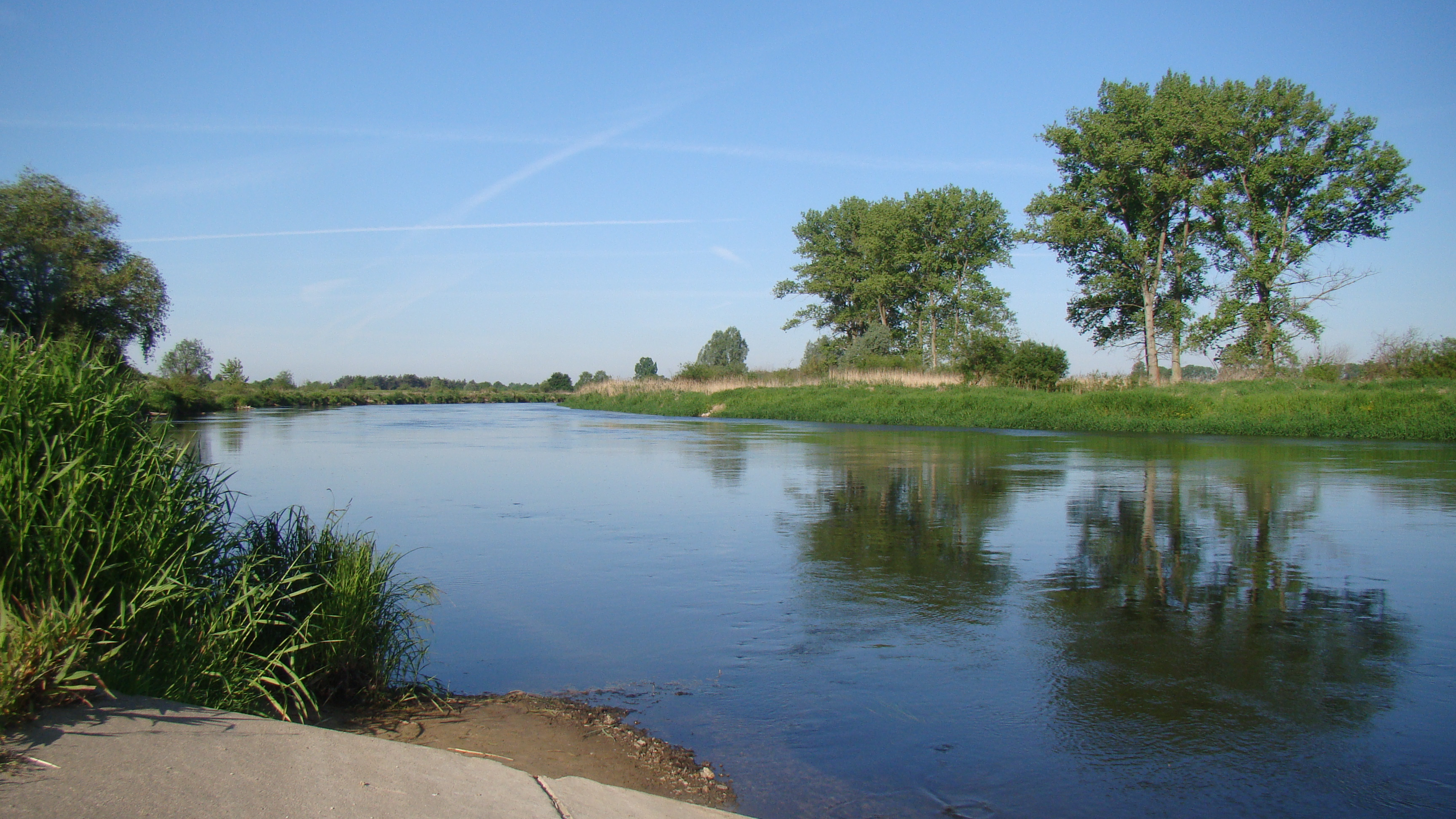 Park krajobrazowy Nadwarciański Park Krajobrazowy. Rzeka Warta. Przy przeprawie promowej w Sługocinie.